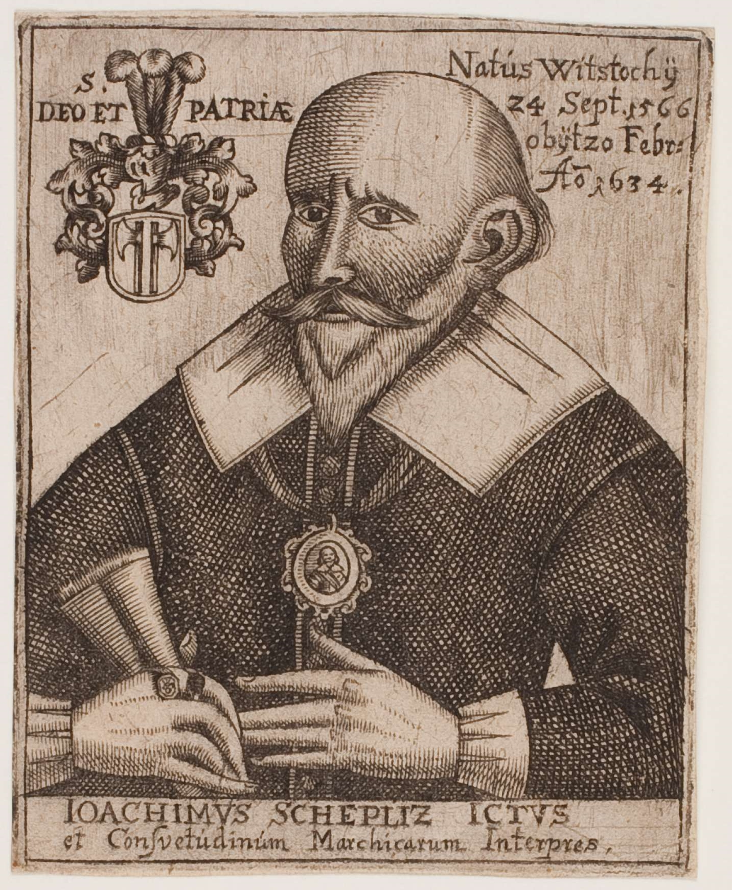 Joachim Scheplitz (1566-1634); Kupferstich in der Herzog-August-Bibliothek Wolfenbüttel, Inventar-Nr. A 27948; 92 x 74 mm, aus: Martin Friedrich Seidel: Icones et Elogia Virorum aliquot prae-stantium qui multum studiis suis consiliisque Marchiam olim nostram iuverunt ac illustrarunt. Berlin? 1671